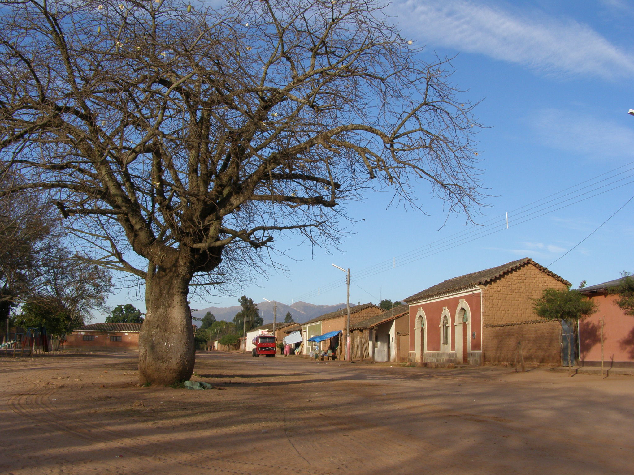 eigen werk